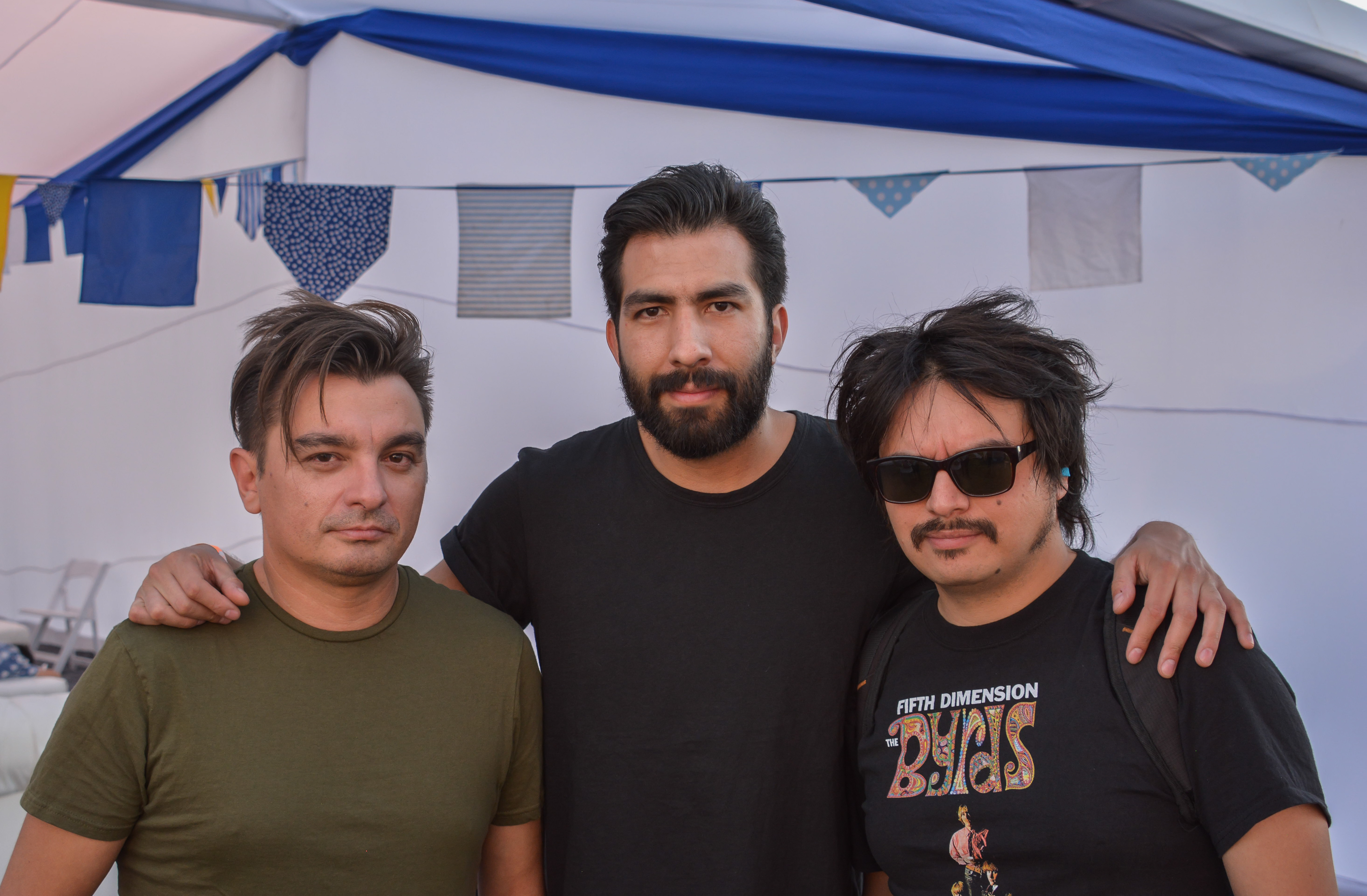 Lanza Internacional (Mauricio Durán, Ricardo Nájera y Francisco Durán) en la Cumbre del Rock Chileno 2018, Santiago, Chile